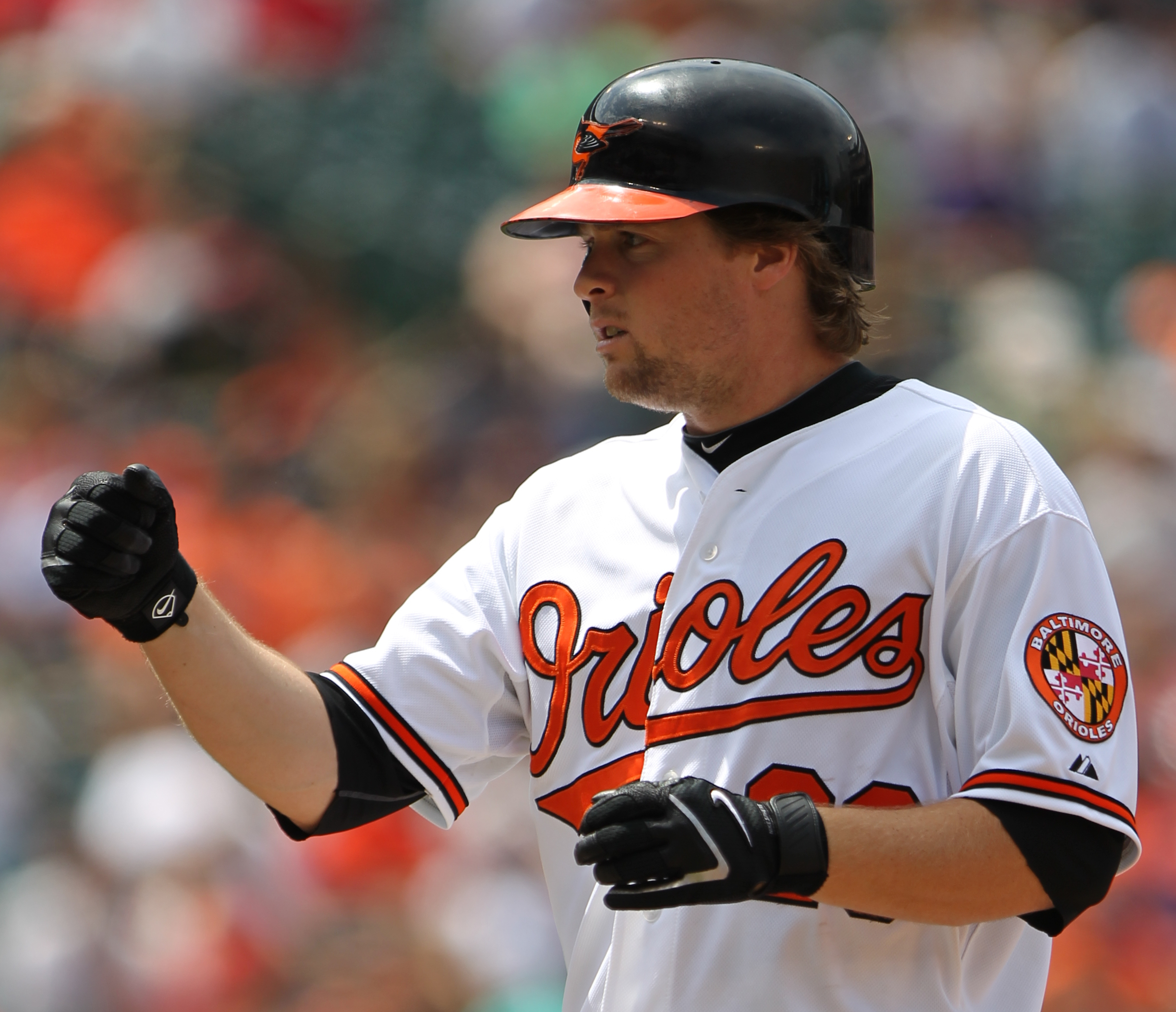 Blake Davis